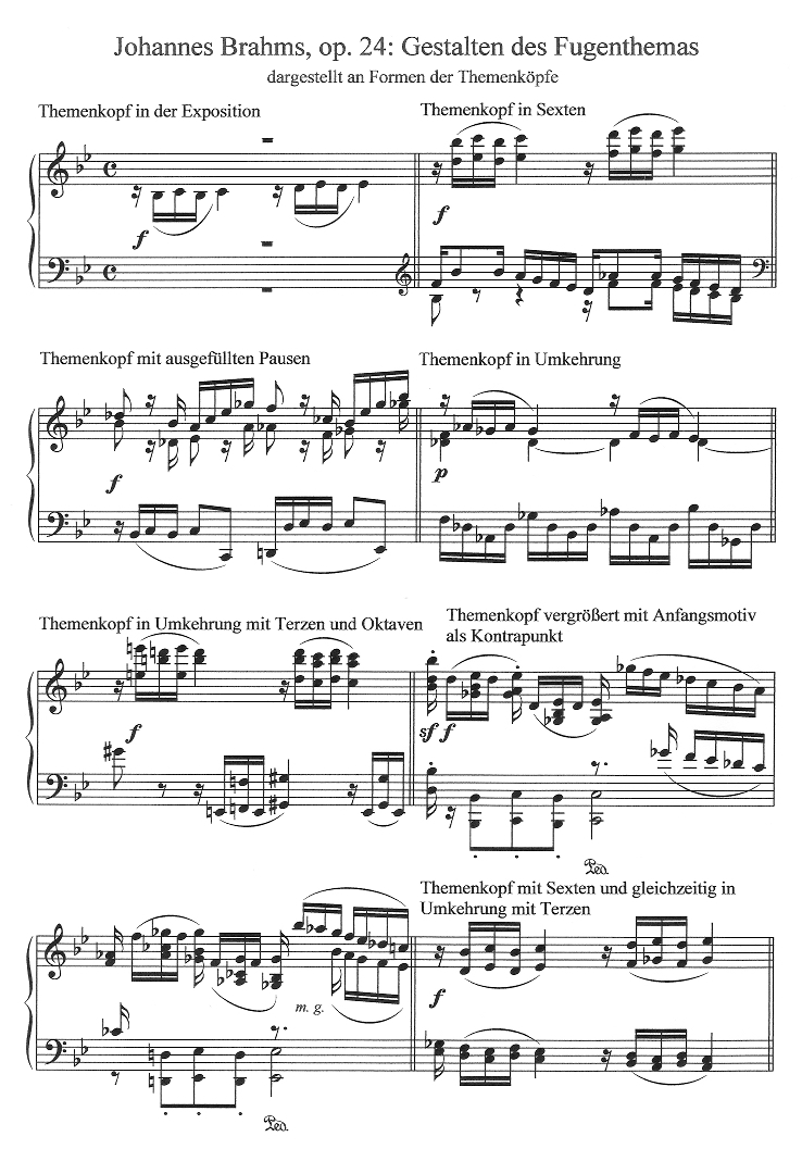 Vielfalt der Gestalten des Fugenthemas aus op. 24 von Johannes Brahms, dargestellt an Formen des Themenkopfes